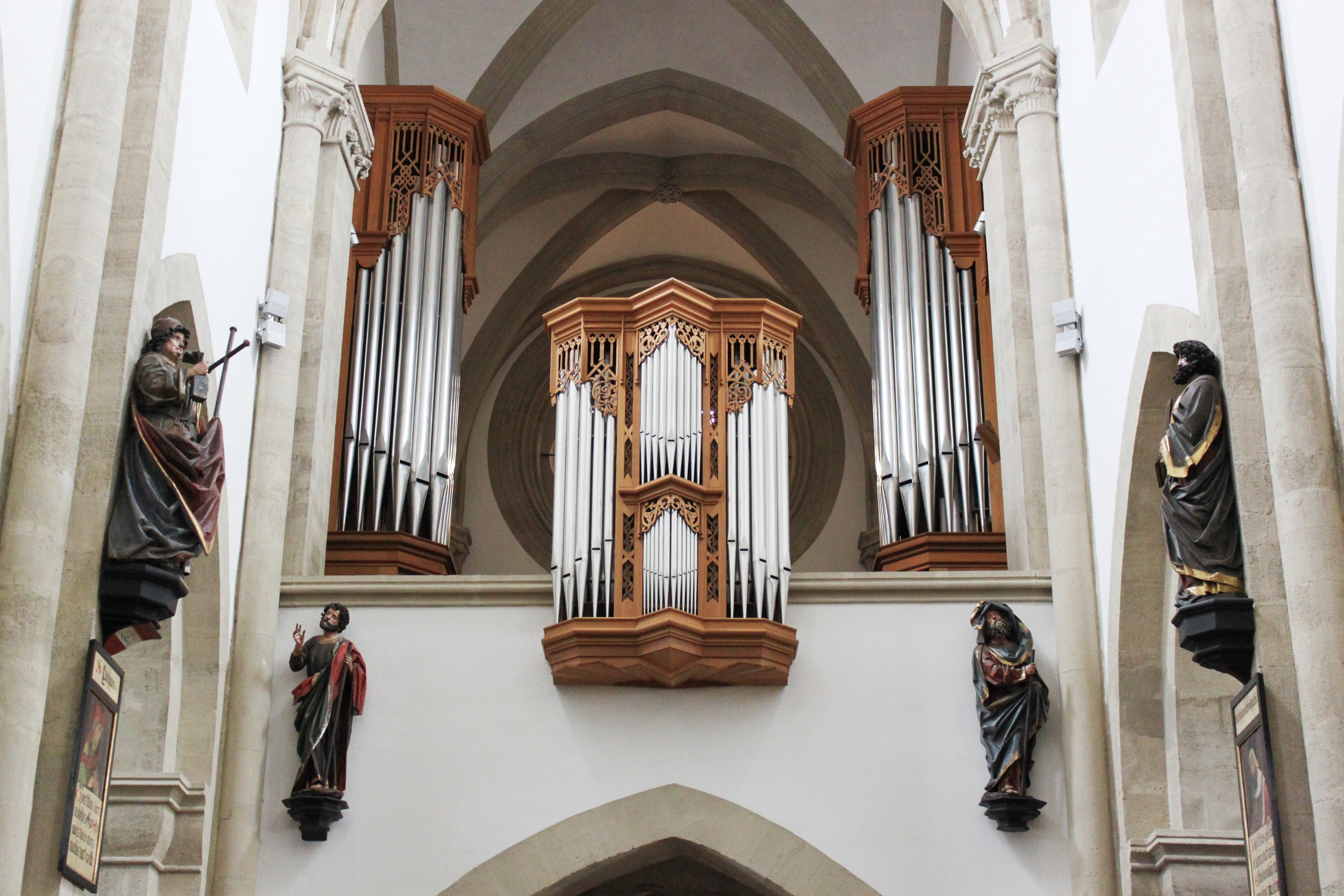 Domorgel zu Wiener Neustadt, errichtet 1989 von Gerhard Hradetzky